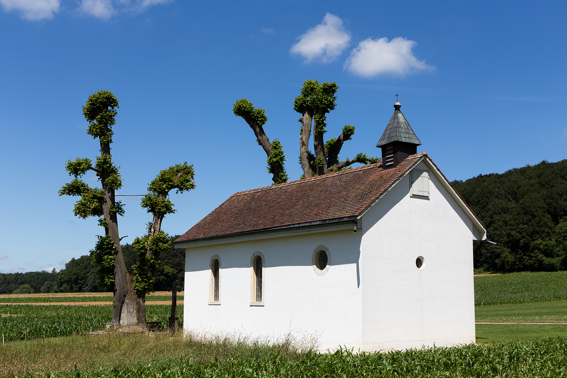 Kapelle St. Immer mit zwei etwa 700-jährigen Linden in Lugnez (JU)